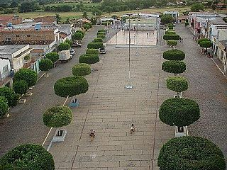 Imagem da Praça Central da Cidade de Rio do Pires, Bahia